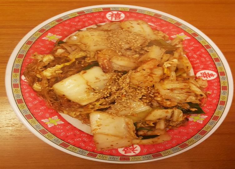 조선말: 태국음식 수끼행이다